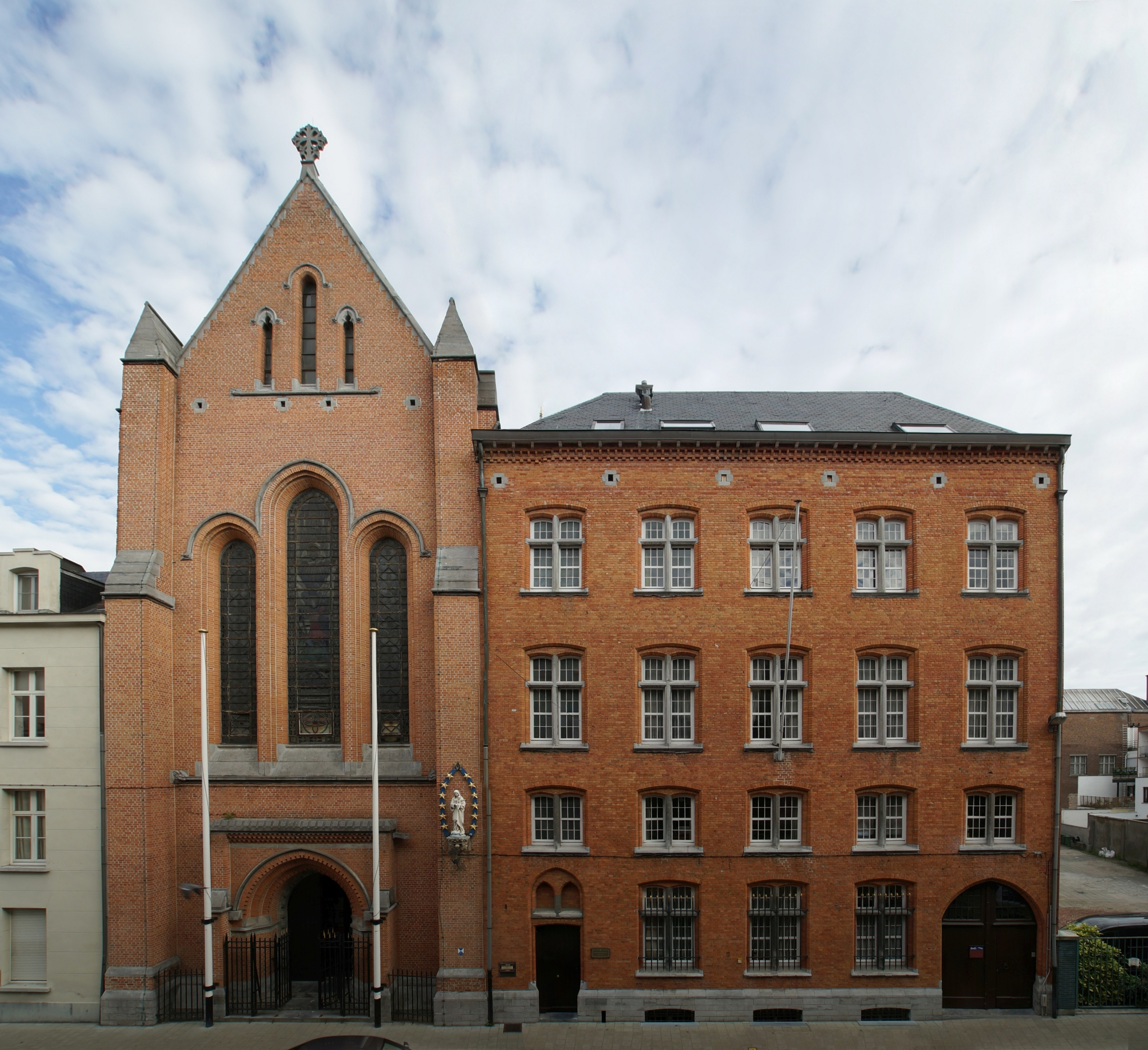 Kapel van het Allerheiligste Sacrament, Hemelstraat, Antwerpen. Oeuvre van architect Ernest Stordiau (anno 1890) (Bewerkt fotomateriaal) - 6872